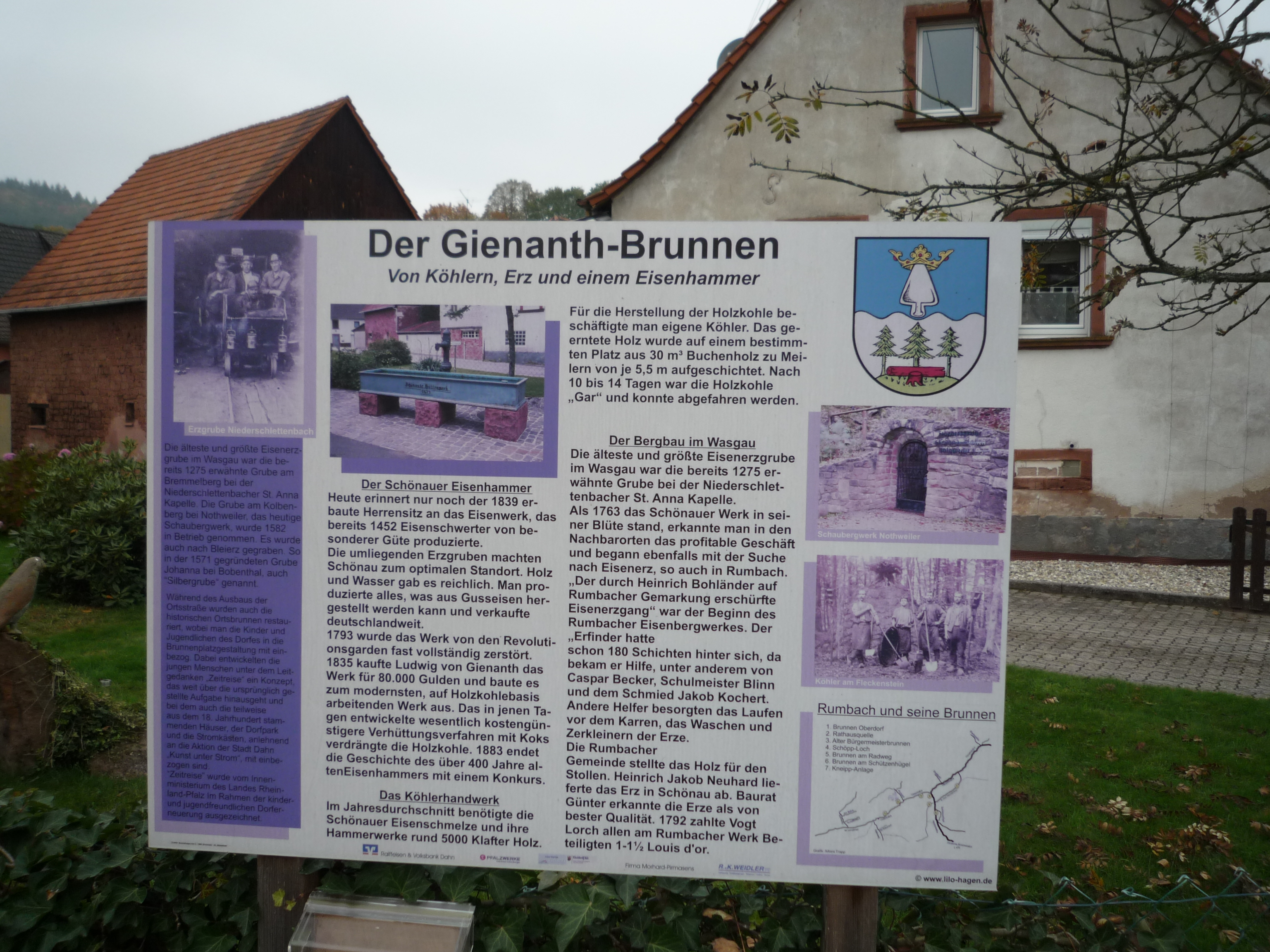 Hinweistafel an Gienandt-Brunnen in Rumbach (Wasgau, Rheinland-Pfalz, Deutschland)